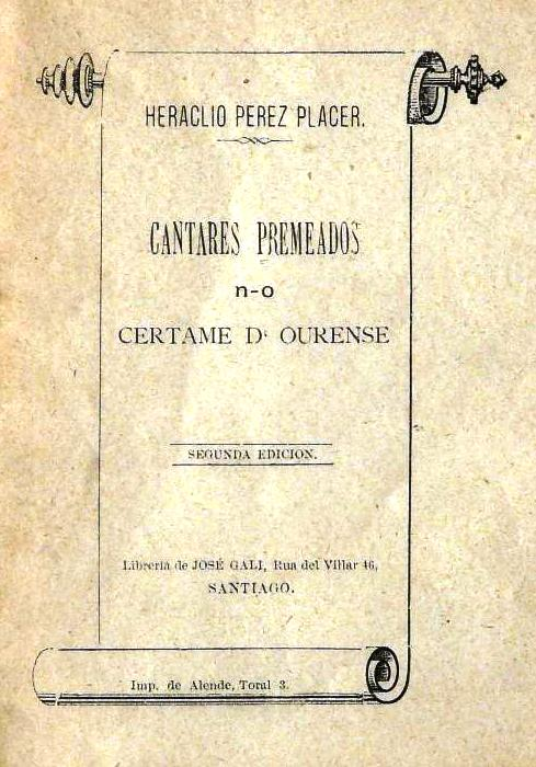 Cantares premeados n-o certame d'Ourense